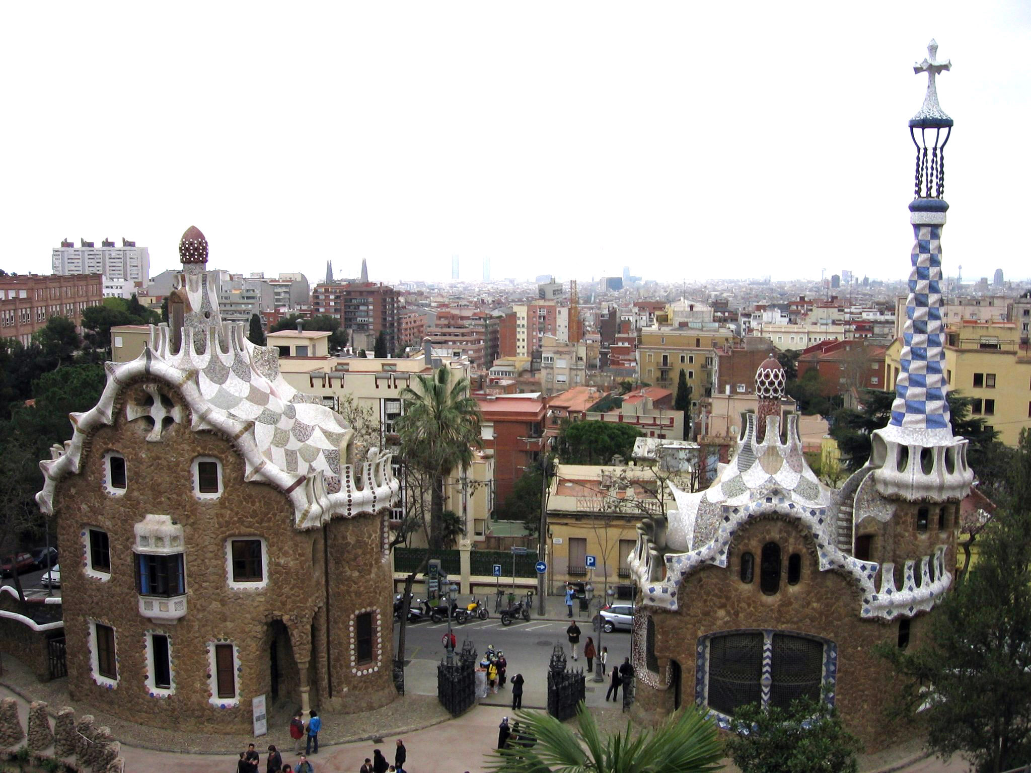 Pabellones de entrada al parque Güell.